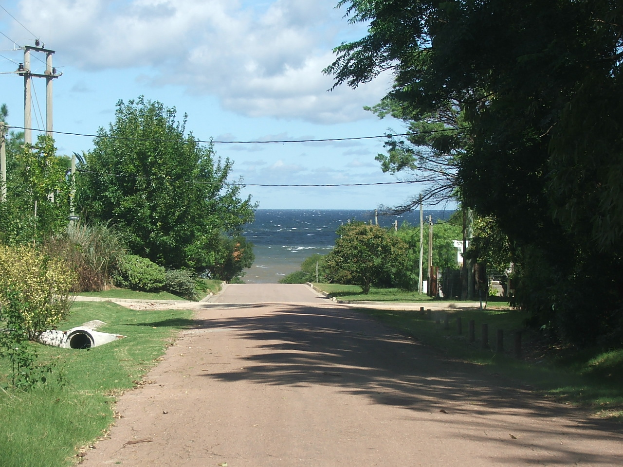 Playa Verde